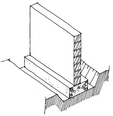 un croquis de ma facture ... vaut mieux qu'un long discours